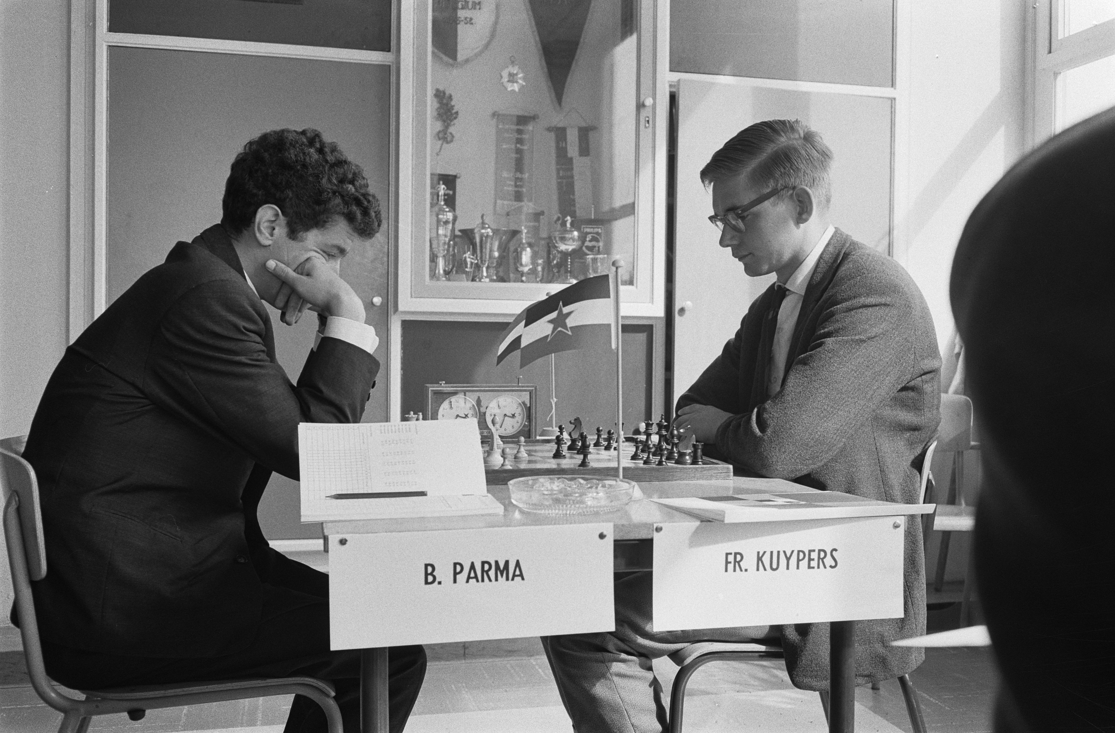 Collectie / Archief : Fotocollectie Anefo Reportage / Serie : [ onbekend ] Beschrijving : Derde IBM Meestertoernooi van start gegaan. B. Parma (Joegoslavië) in aktie tegen Fr. Kuypers (kampioen van Nederland). Datum : 28 augustus 1963 Trefwoorden : schaken, sport Fotograaf : Walta, Winfried / Anefo Auteursrechthebbende : Nationaal Archief Materiaalsoort : Negatief (zwart/wit) Nummer archiefinventaris : bekijk toegang 2.24.01.05 Bestanddeelnummer : 915-4834